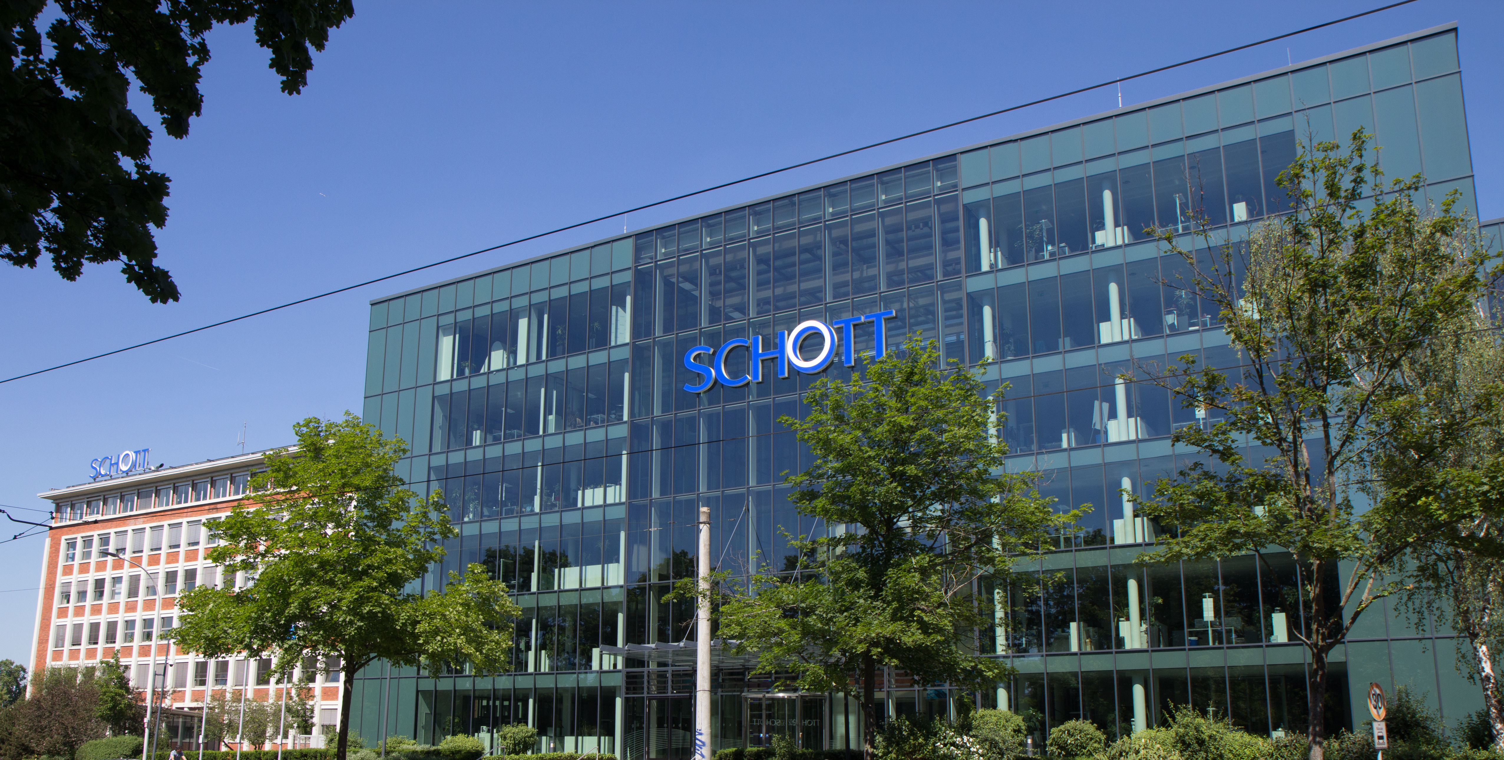 Zentrale der SCHOTT AG in Mainz